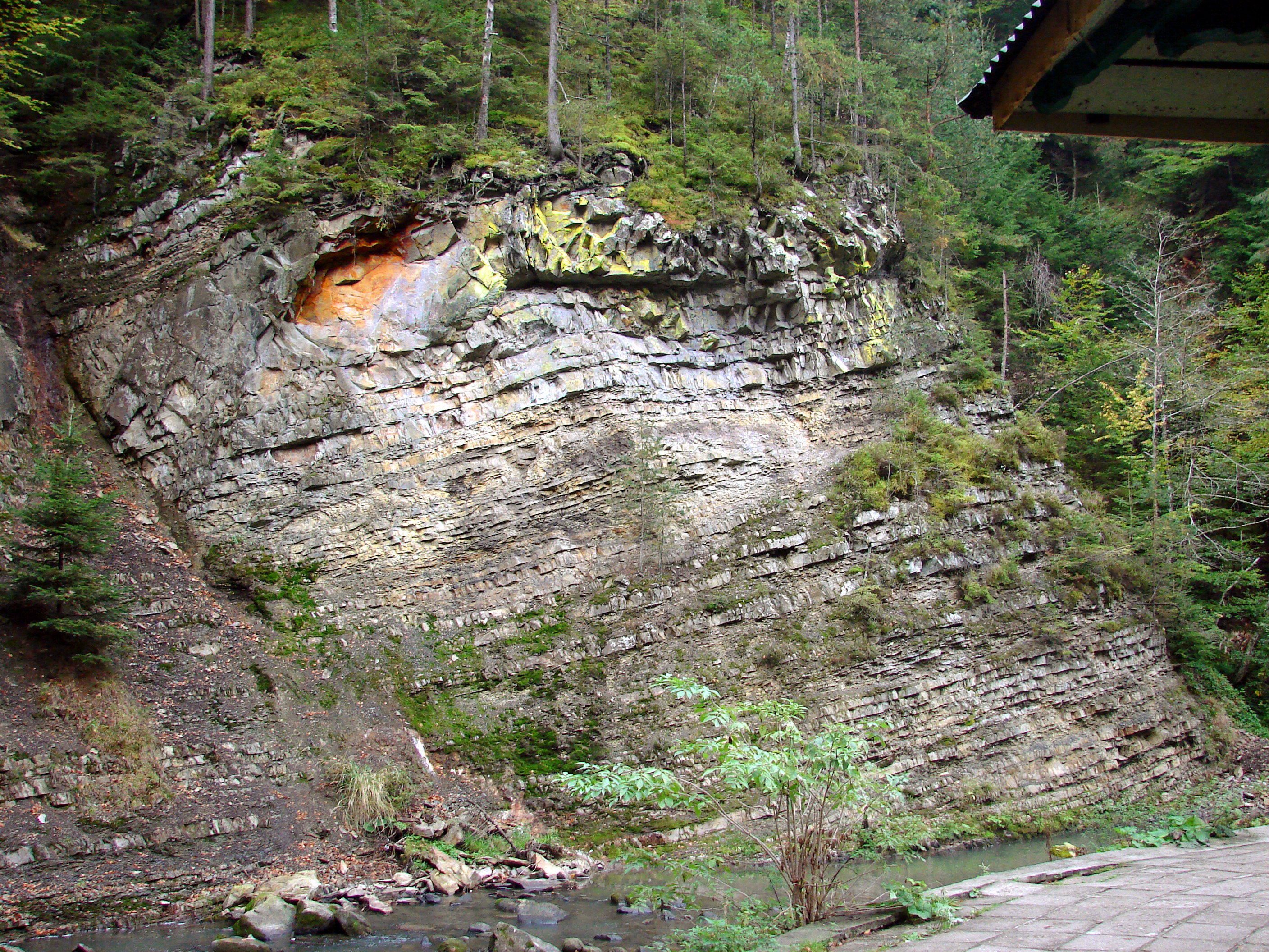 Slănic Moldova, depuneri de sulf și fier